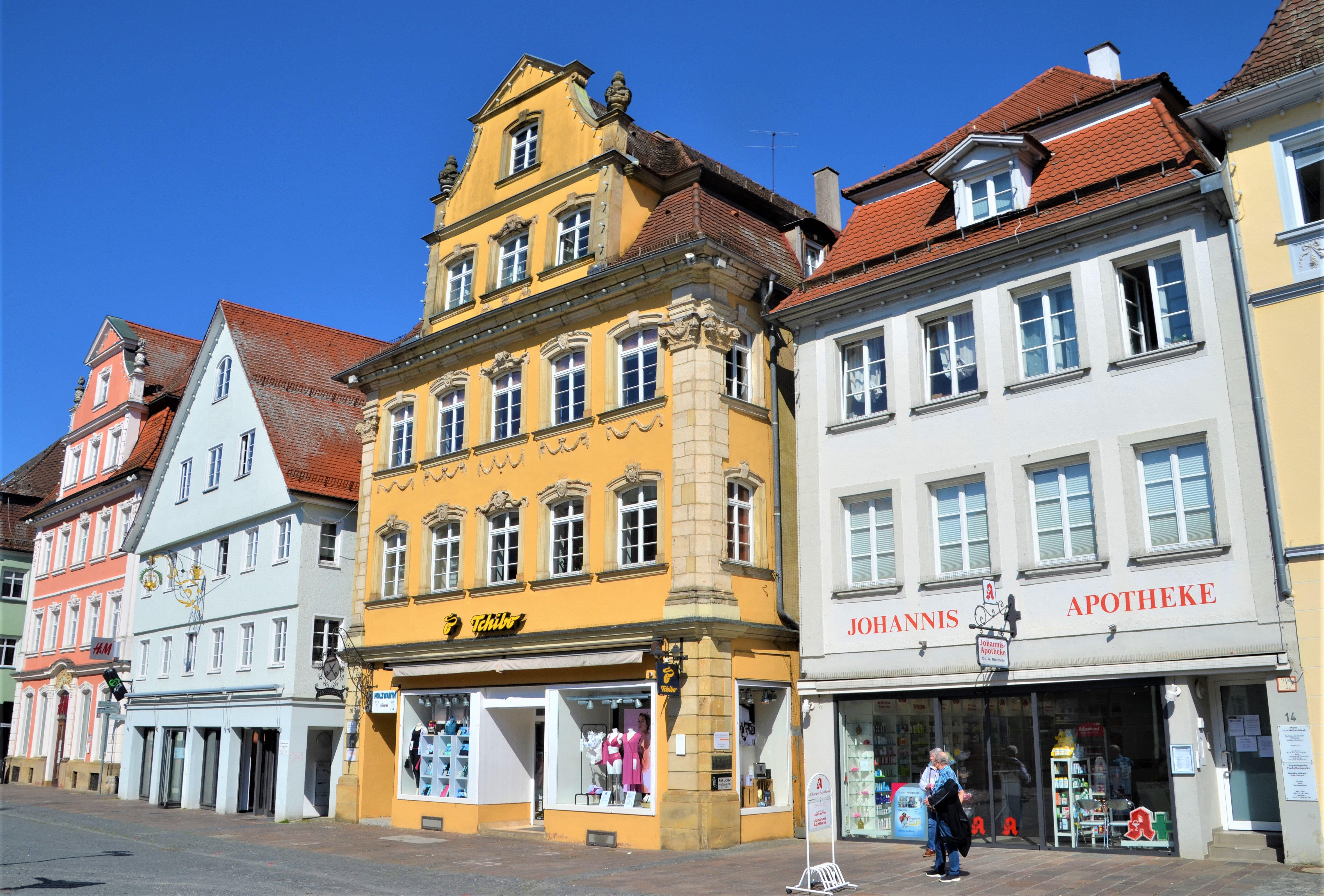 Marktplatz 14 bis 20 in Schwäbisch Gmünd, östliche Marktplatzseite